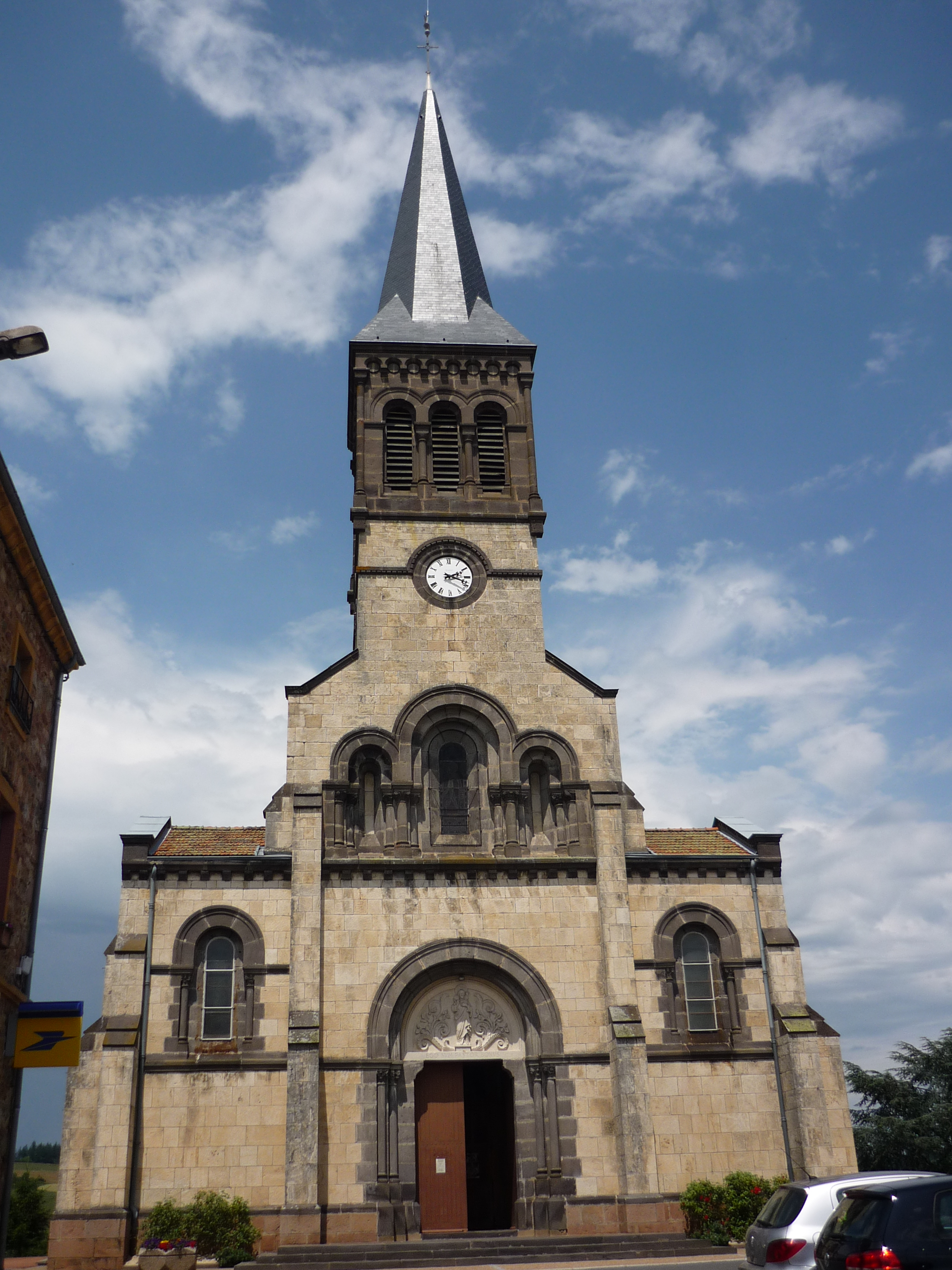 Vue de la façade de l'église de Saint-Just-d'Avray, dans le département du Rhône en France